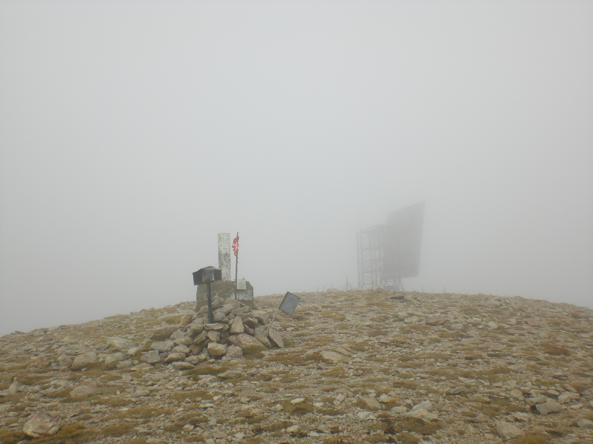 Cim del Puigllançada (octubre 2011)